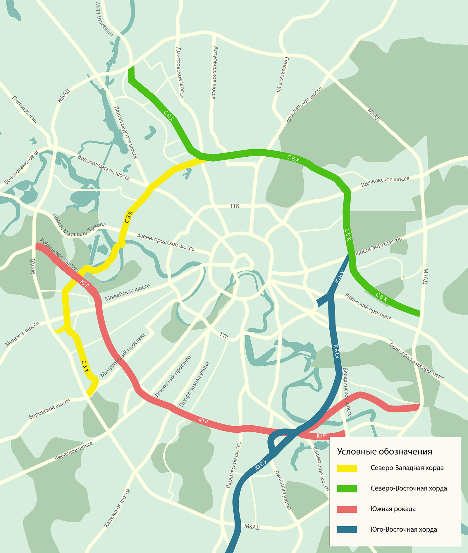 Хордовое кольцо Москвы